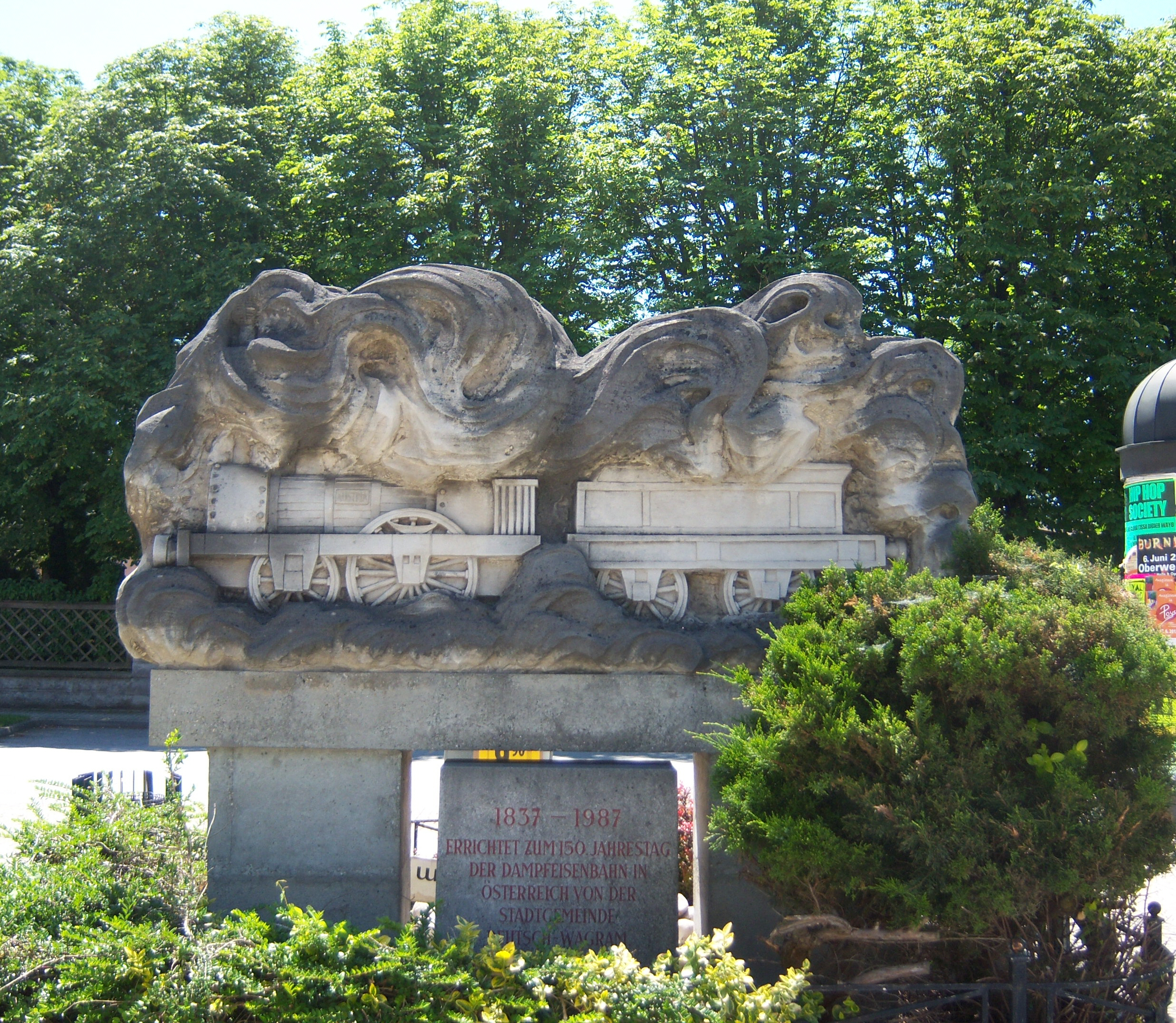 Sandstein-Denkmal 150 Jahre Eisenbahn (1837–1987) neben dem Aufnahmsgebäude des Bahnhofs in Deutsch-Wagram in Niederösterreich. 1987 erstellt von Leopold Grausam jun., als Meister der Städtischen Steinmetzwerkstätte Wien.